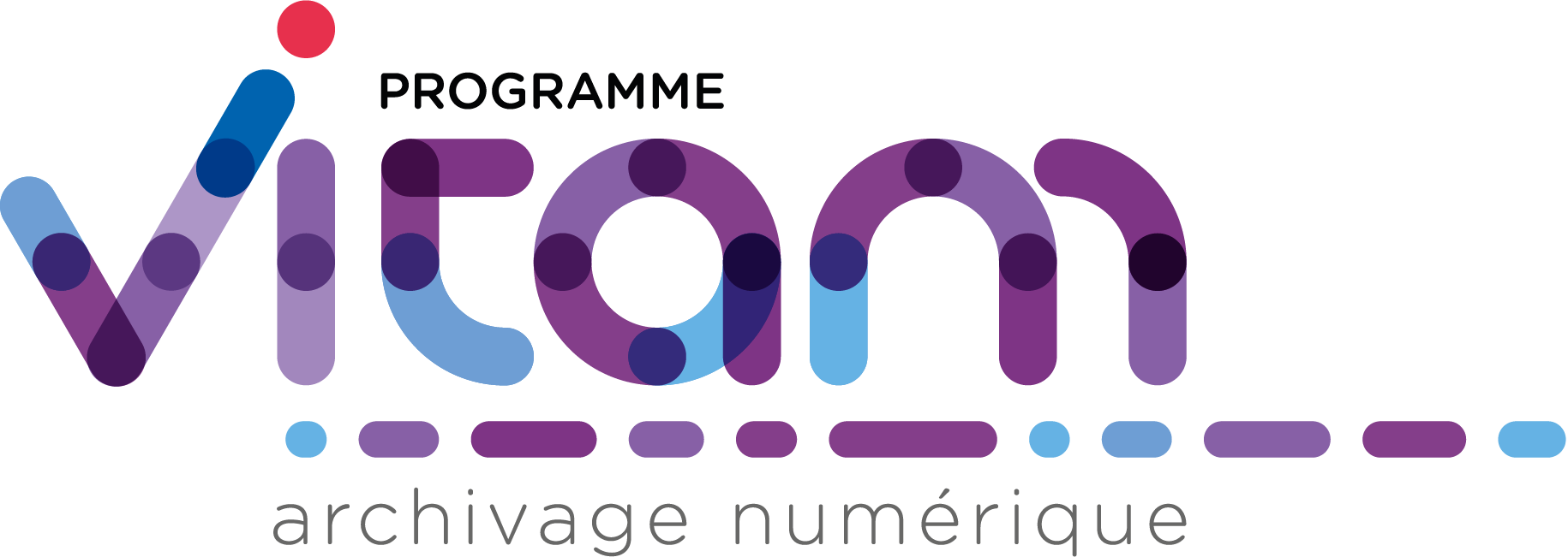 Logo du logiciel libre Vitam